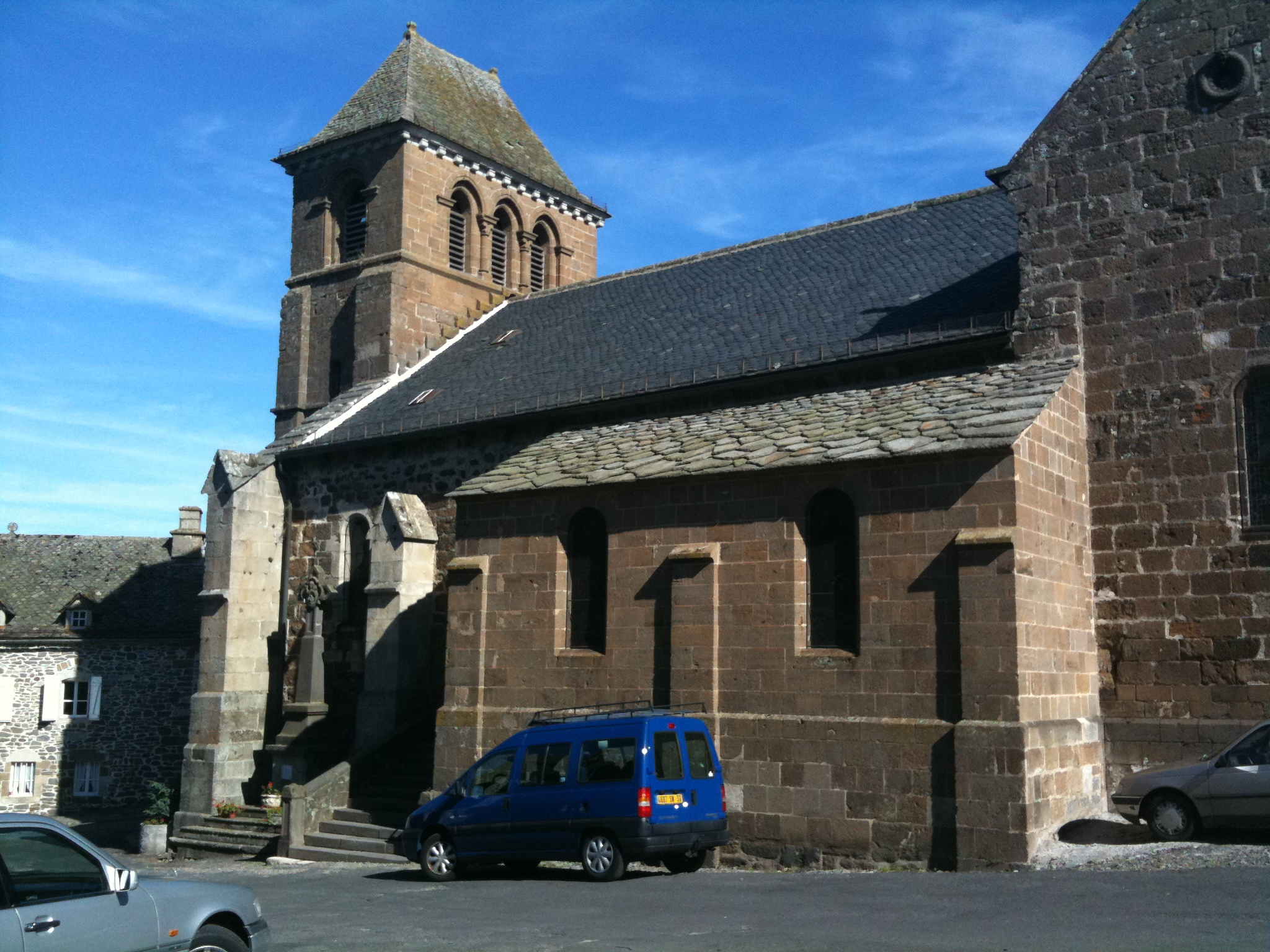 L'eglise de Trizac, datant du XI eme siecle